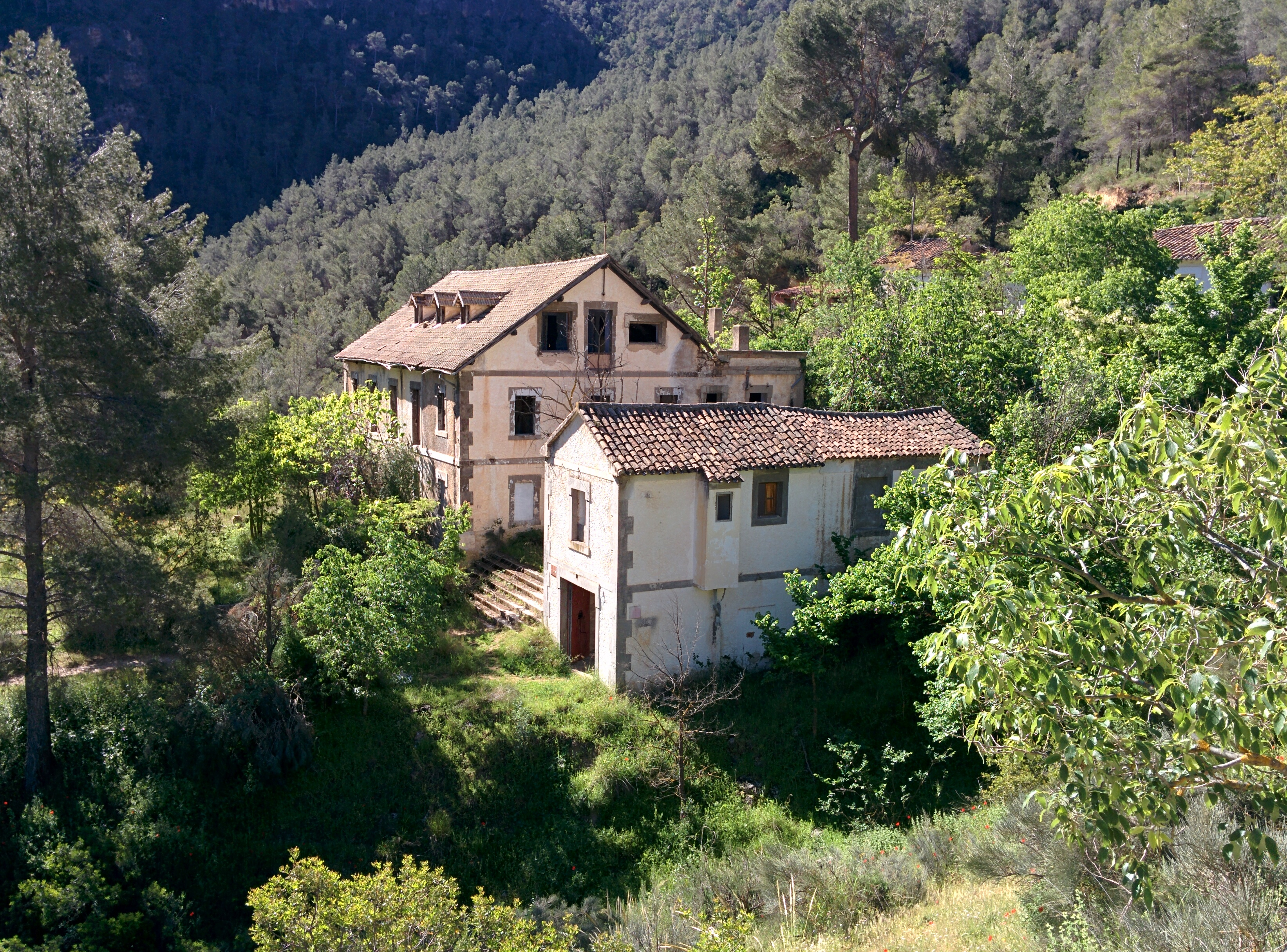 Poblado El Molinar, en Villa de Ves (Albacete, España).